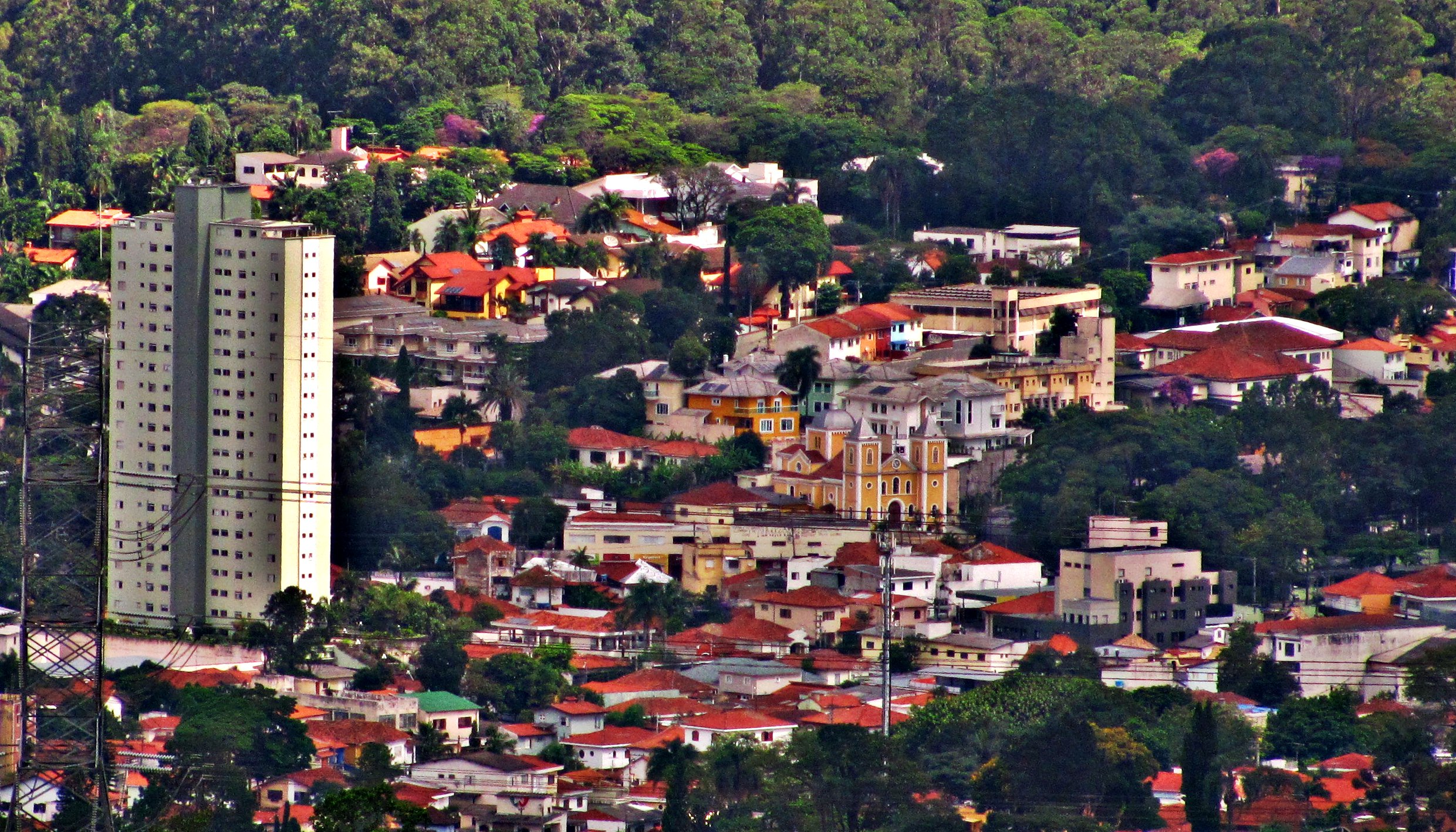 Centro do Bairro do Tremembé visto da Cantareira